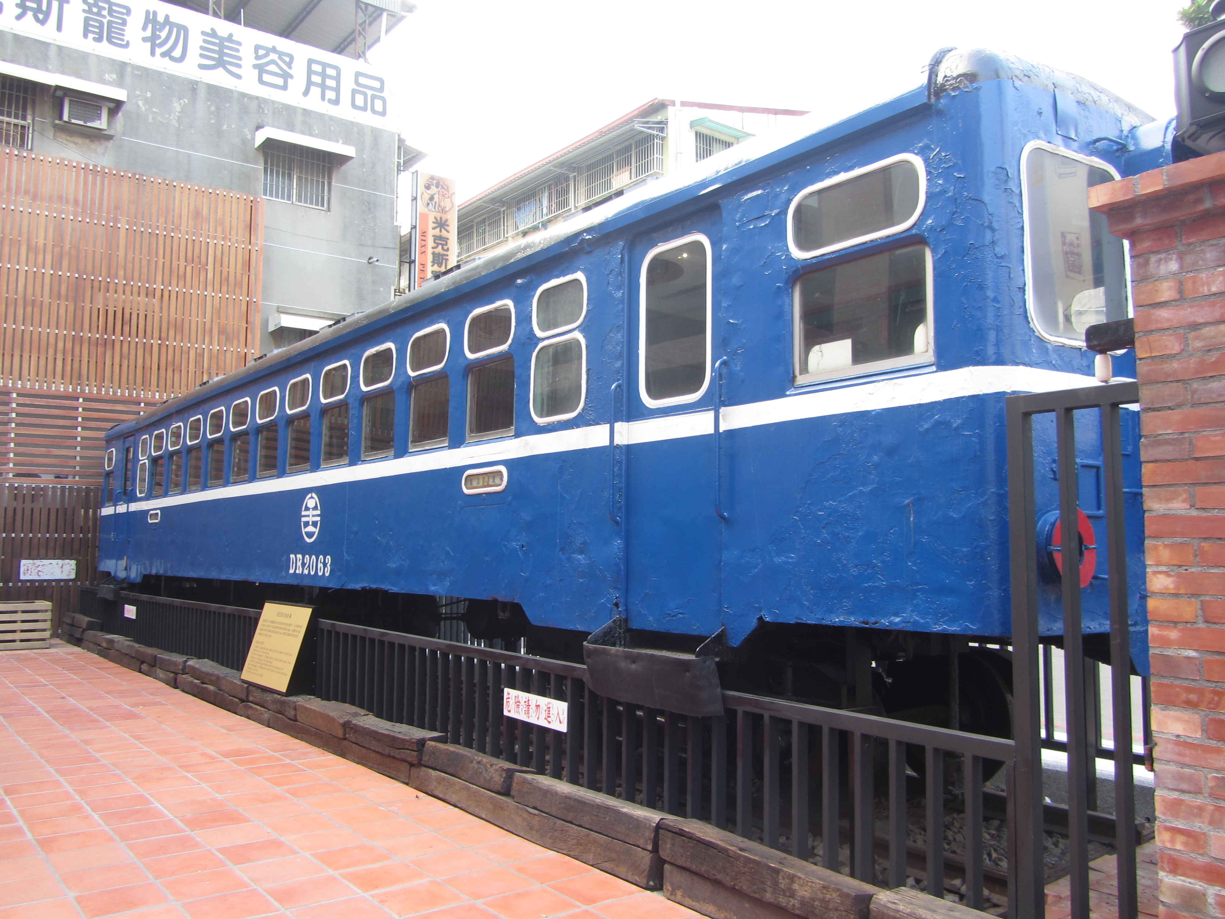 位於新台灣原味餐廳鳳山館現址的DR2063柴油客車拖車